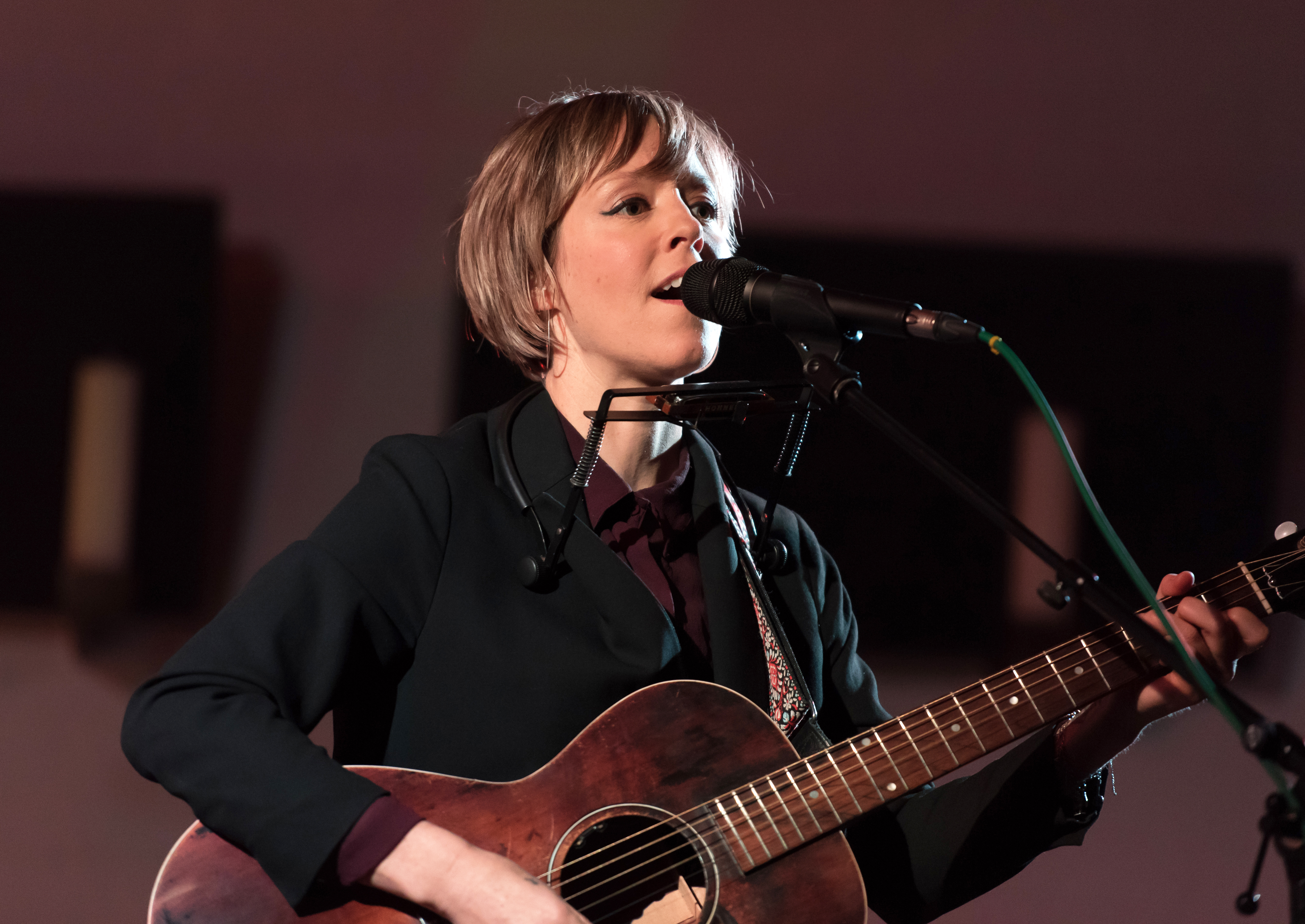 Emily Barker bei Lottes Musiknacht in der Ansgarkirche Elmshorn 2018 2018